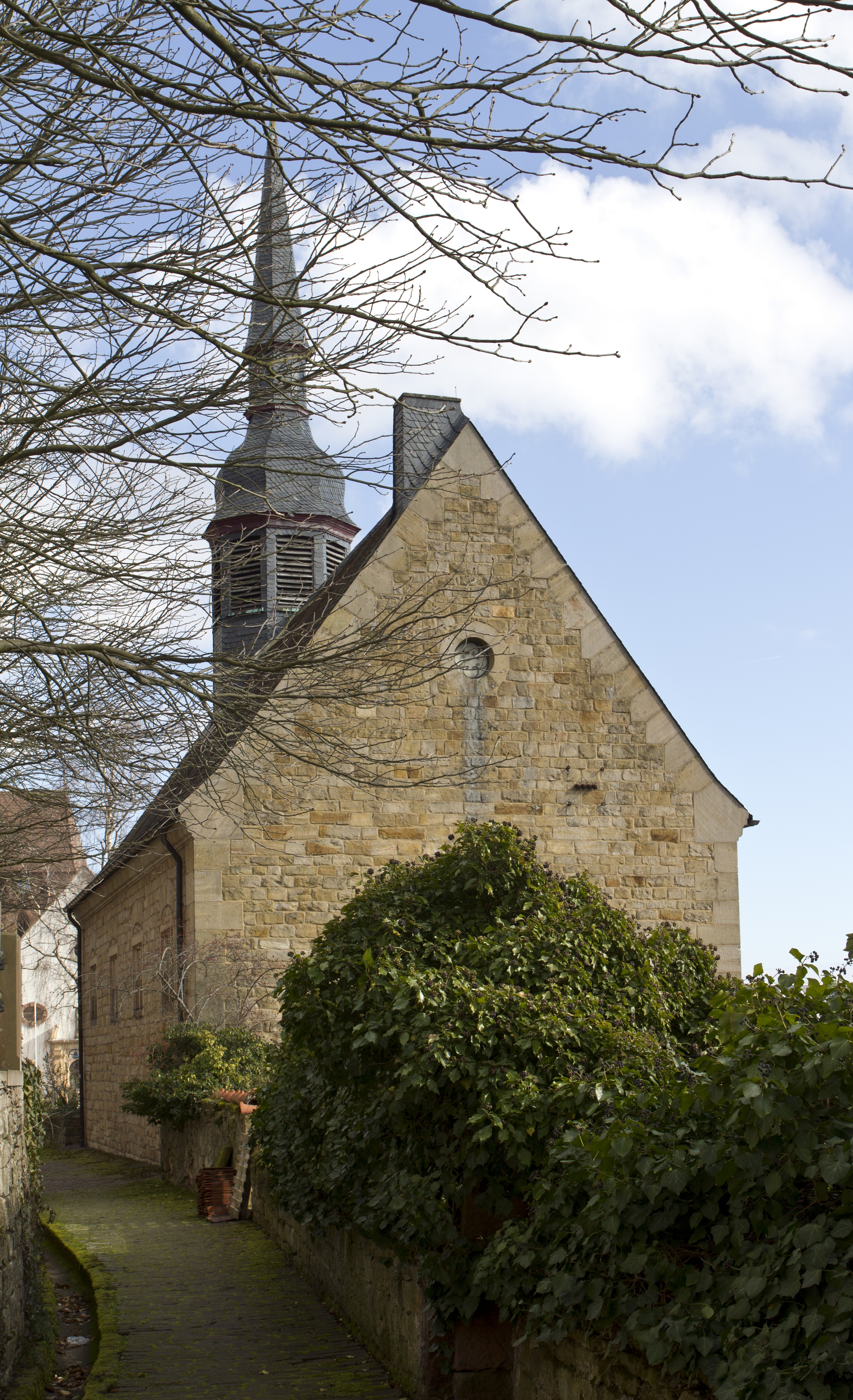 Gleisweiler, protestantische Martin-Bucer-Kirche